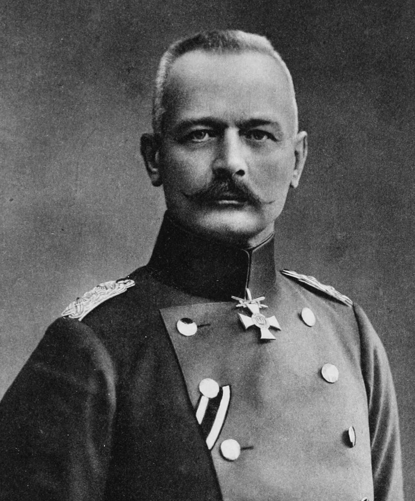 Erich von Falkenhayn, Brustbild-Ausschnitt eines größeren Fotos von Albert Meyer, vergleiche Postkarte vom Bundesarchiv